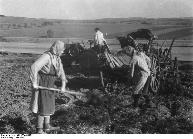 Bauern beim Dungausfahren (Kr. Möbiskrug) Illus Sowjetische Besatzungszone Deutschlands 1947 Frühjahrsbestellung in Thüringen. - Bauern des Kreises Möbiskrug beim Dungeausfahren. Aufnahme: 27.5.1947